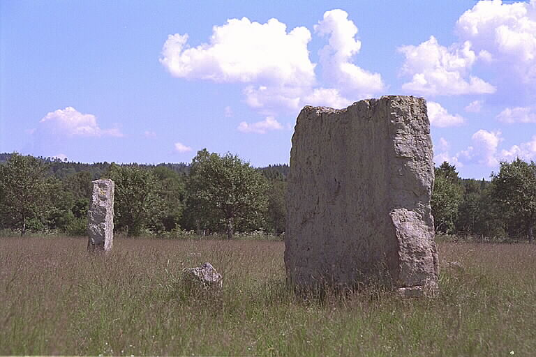 Resta stenar. Motiv: Ekornavallen Nyckelord: Raä-Fastigheter, Riksintressen Kategori: Grav markerad av rest sten/block Resta stenar.